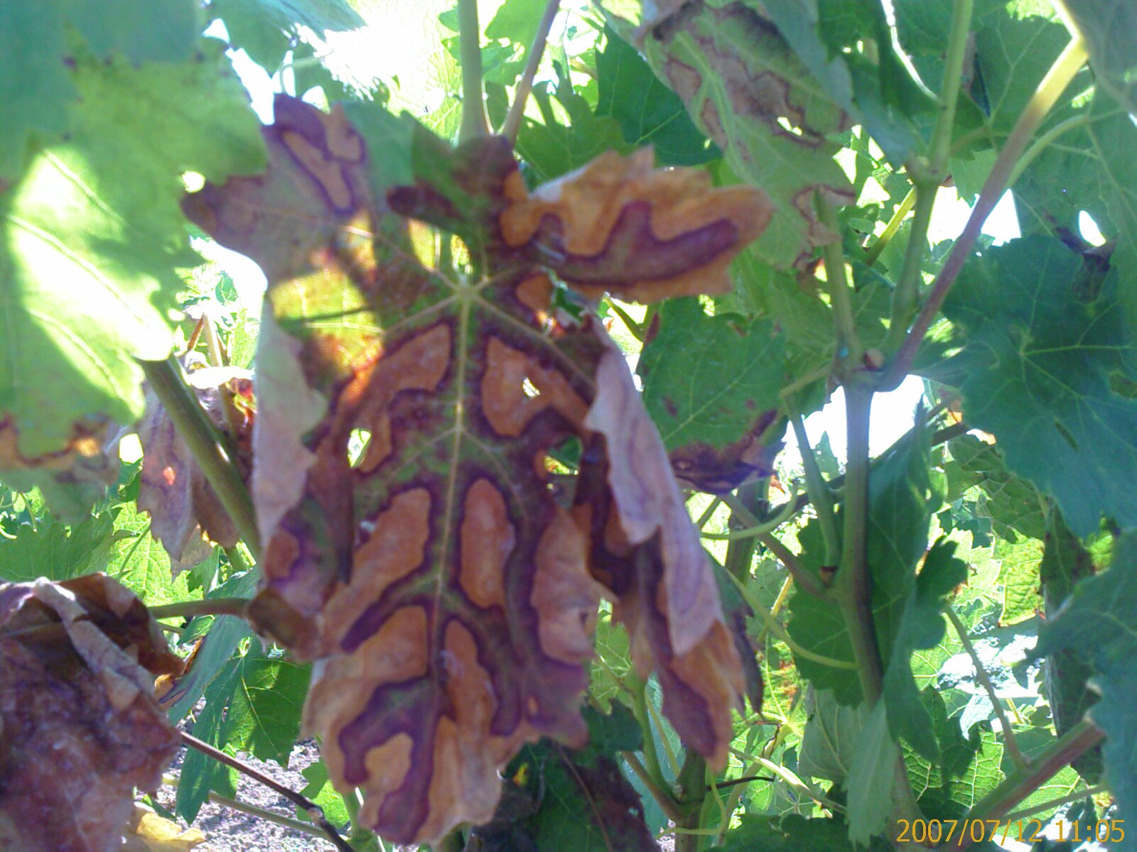 Síntomas de Botriosfera en hojas de vid